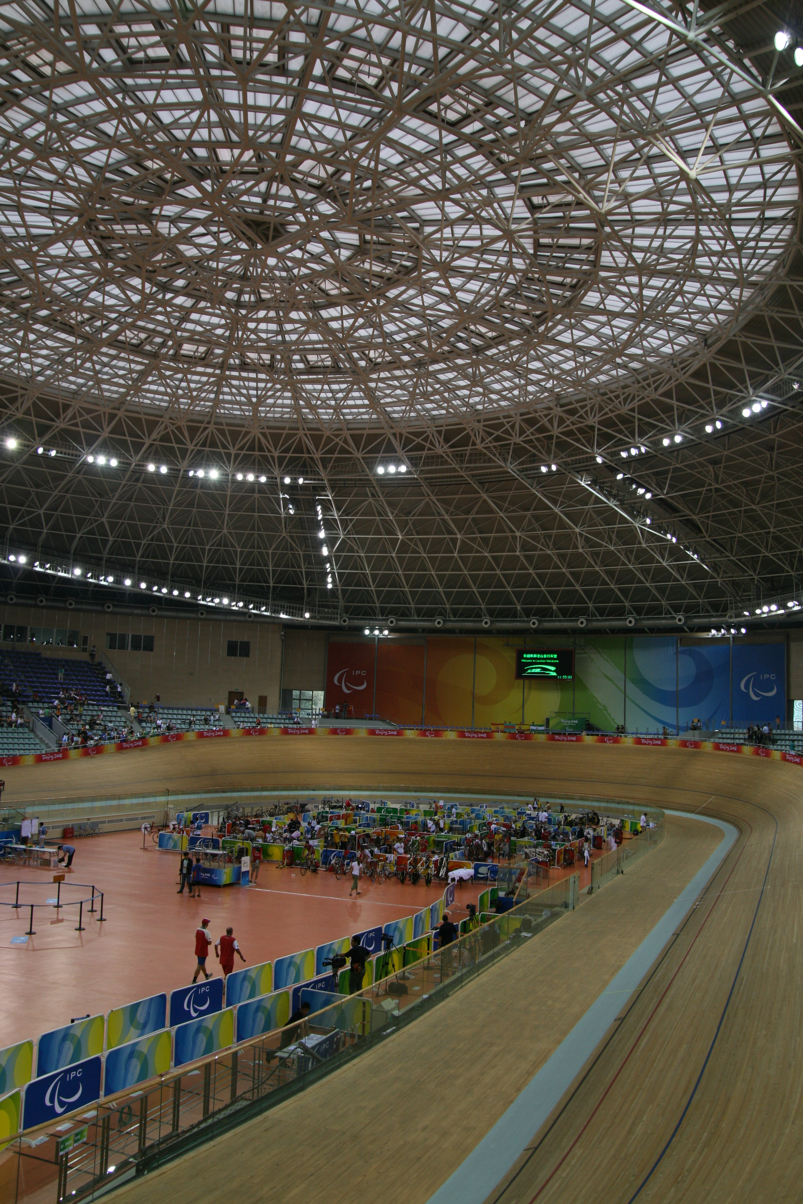 Laoshan Velodrome, Bejing, China